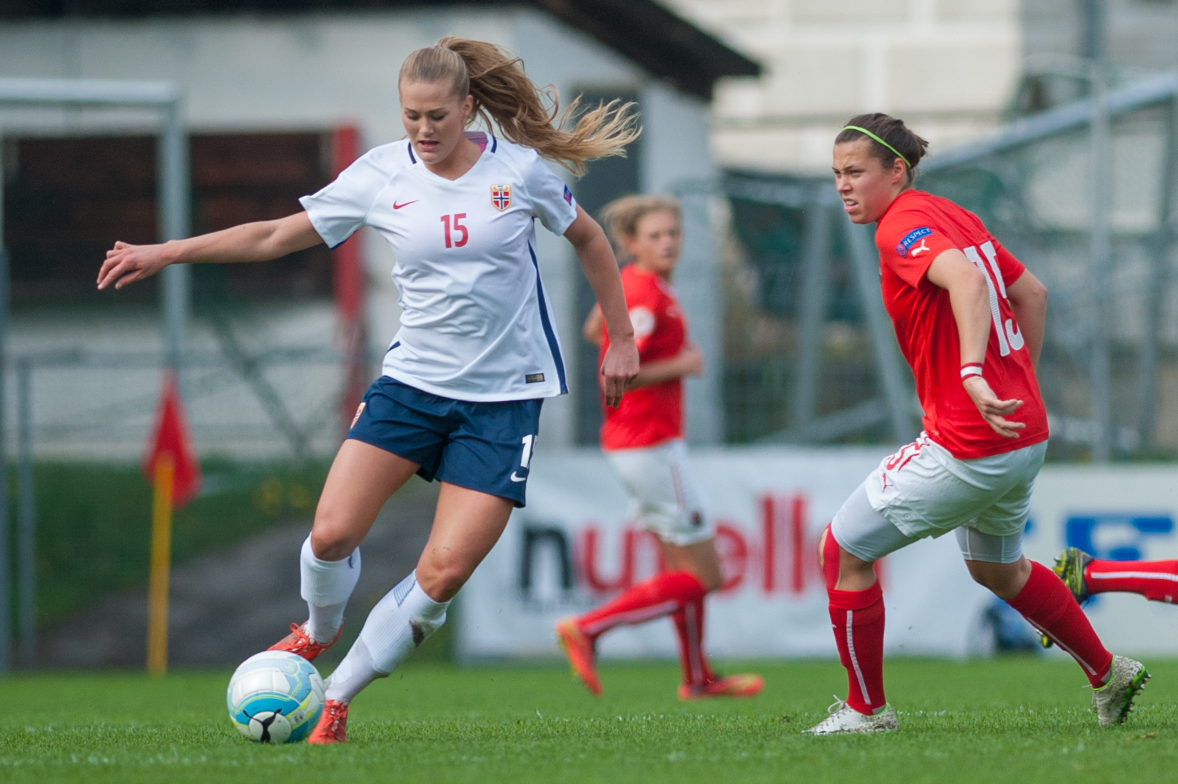 Steyr, Austria, 10.04.2016, ÖFB Frauen EM-Qualifikation - Österreich vs Norwegen. Bild zeigt Lisa-Marie Utland (NOR).